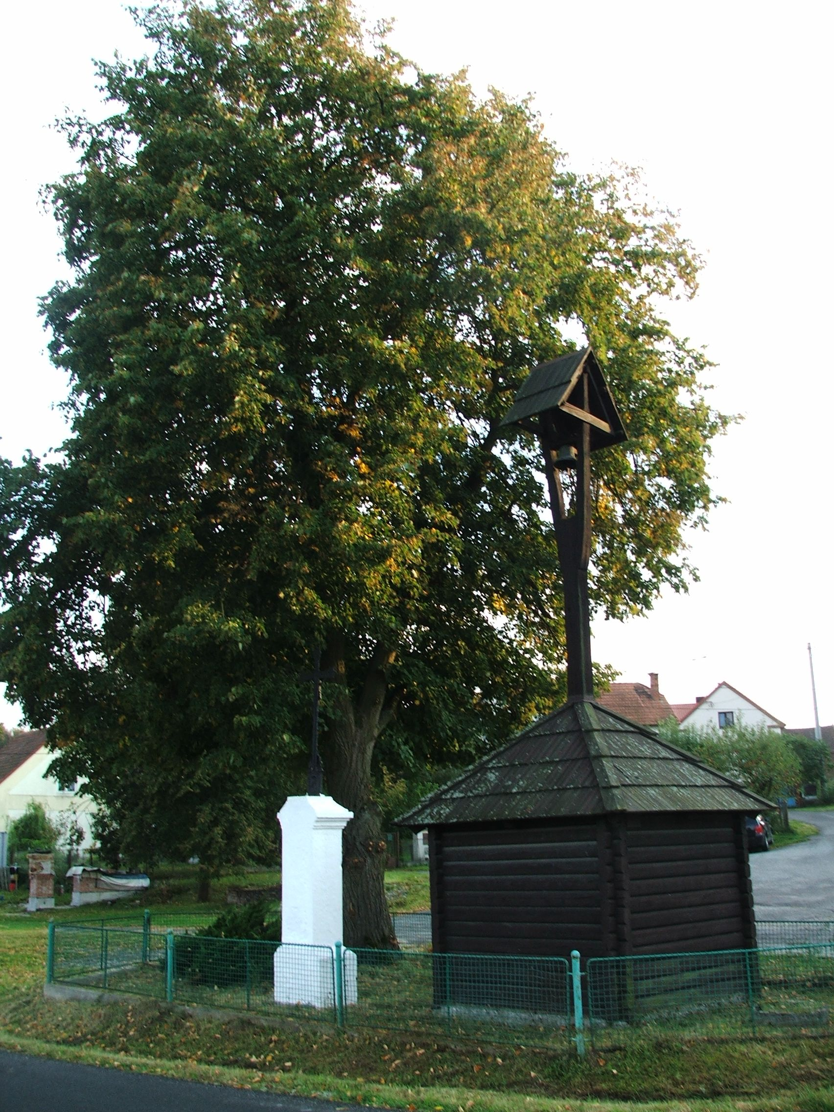 Zvonice, Bučí.